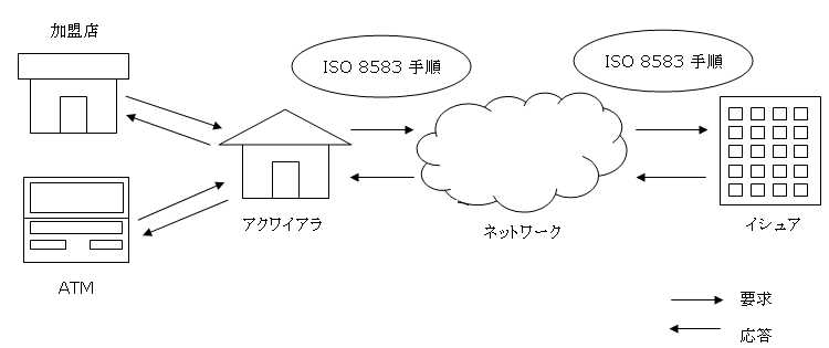 ISO 8583が利用されている箇所の説明